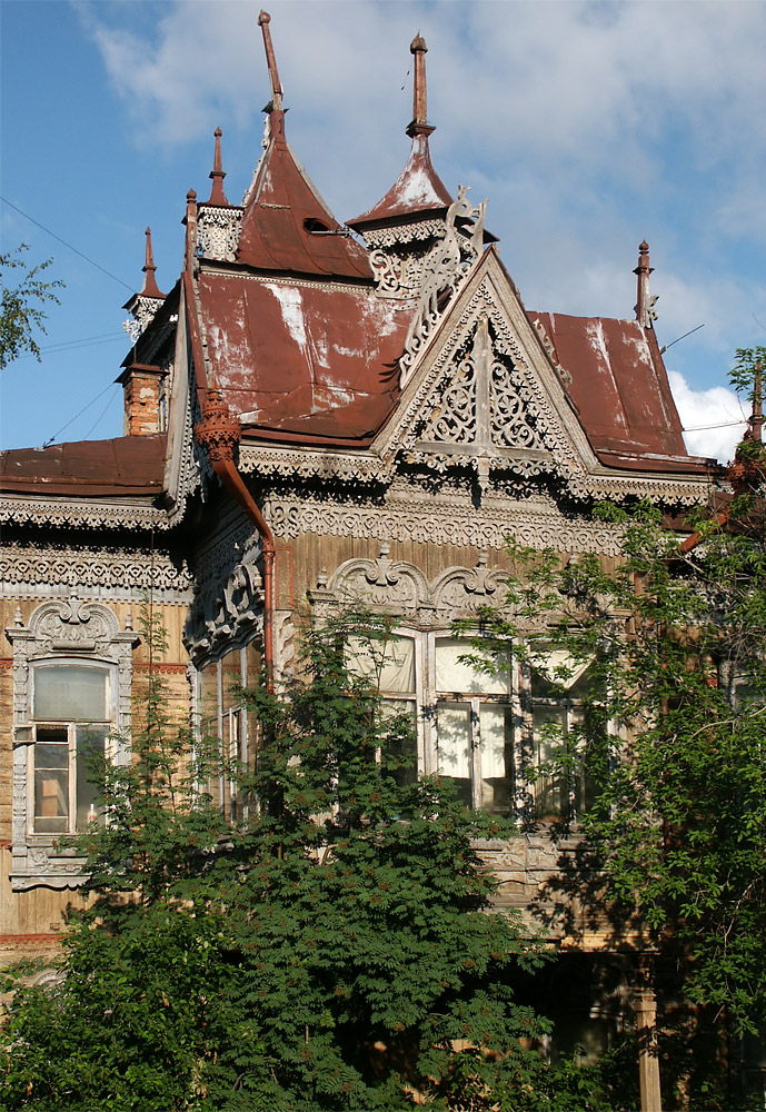 Красноармейская 67/1, Томск. Photo by Pavel Andryushchenko